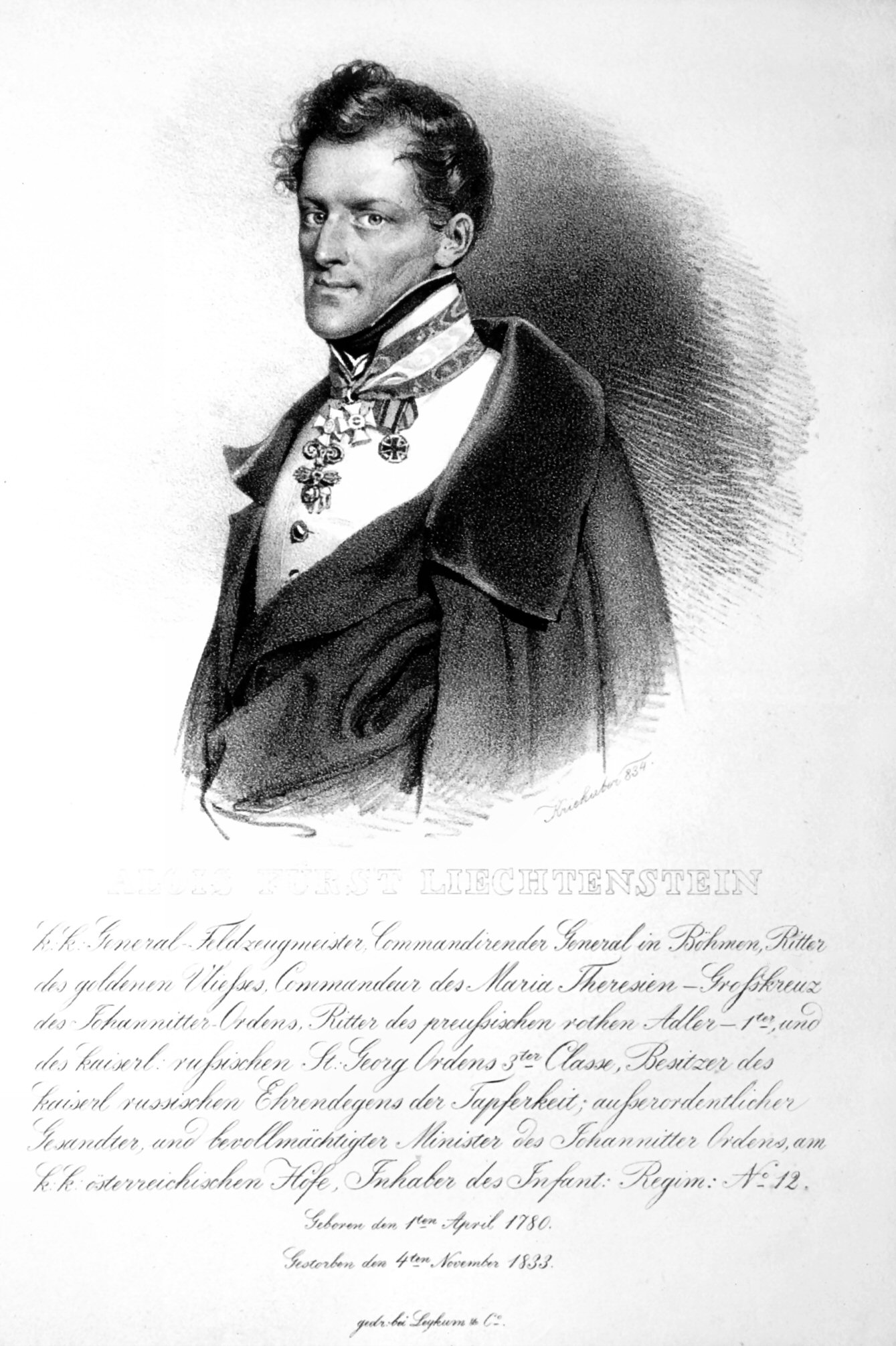 Alois Fürst Liechtenstein (1780-1833), Feldzeugmeister, Ritter des Goldenen Vlieses, Kommandeur des Maria-Theresien-Ordens. Lithographie von Josef Kriehuber 1834